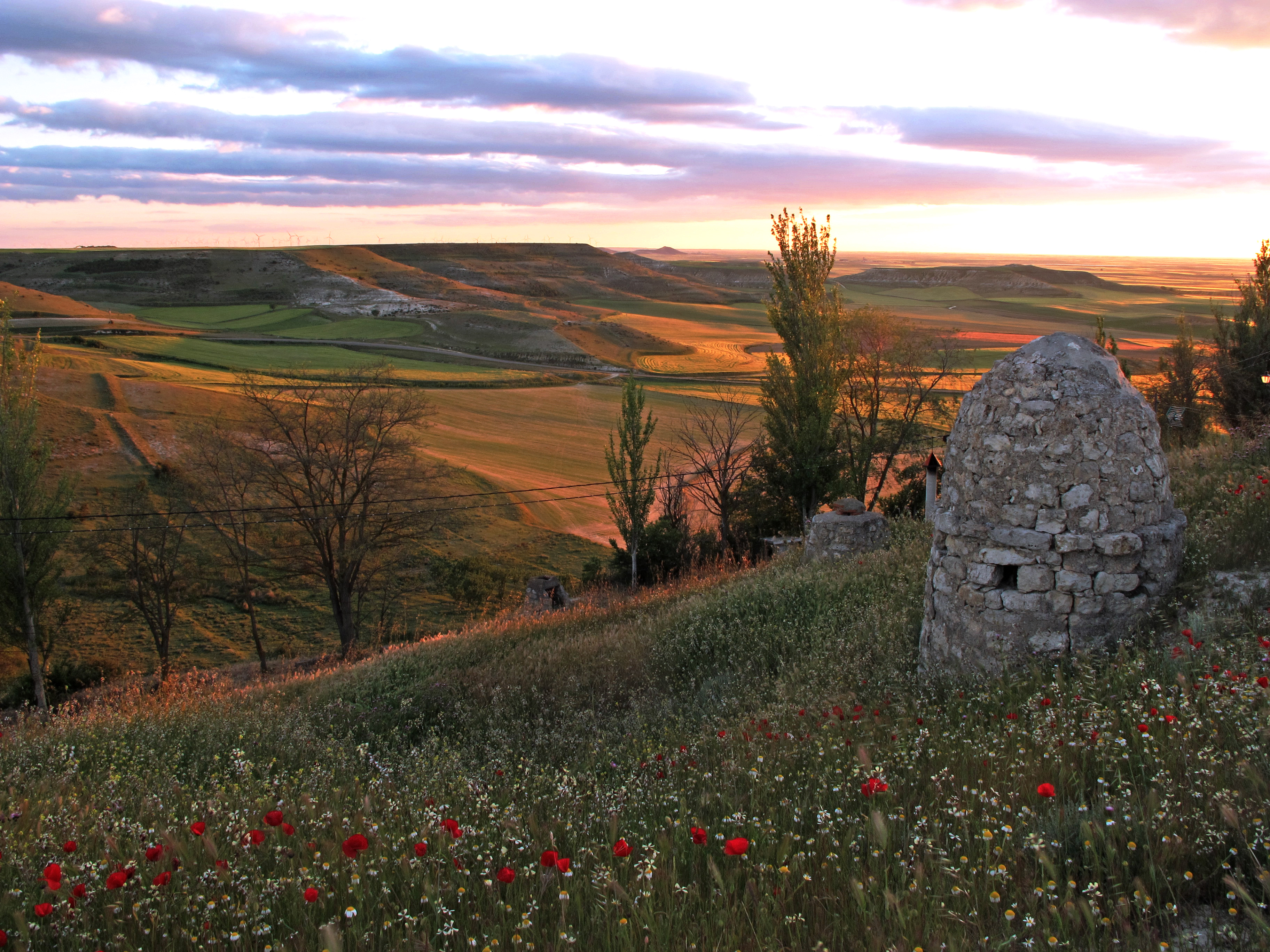 Mirador de Autilla del Pino (Palencia).